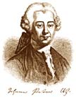 Porträt von Johann Peter Uz